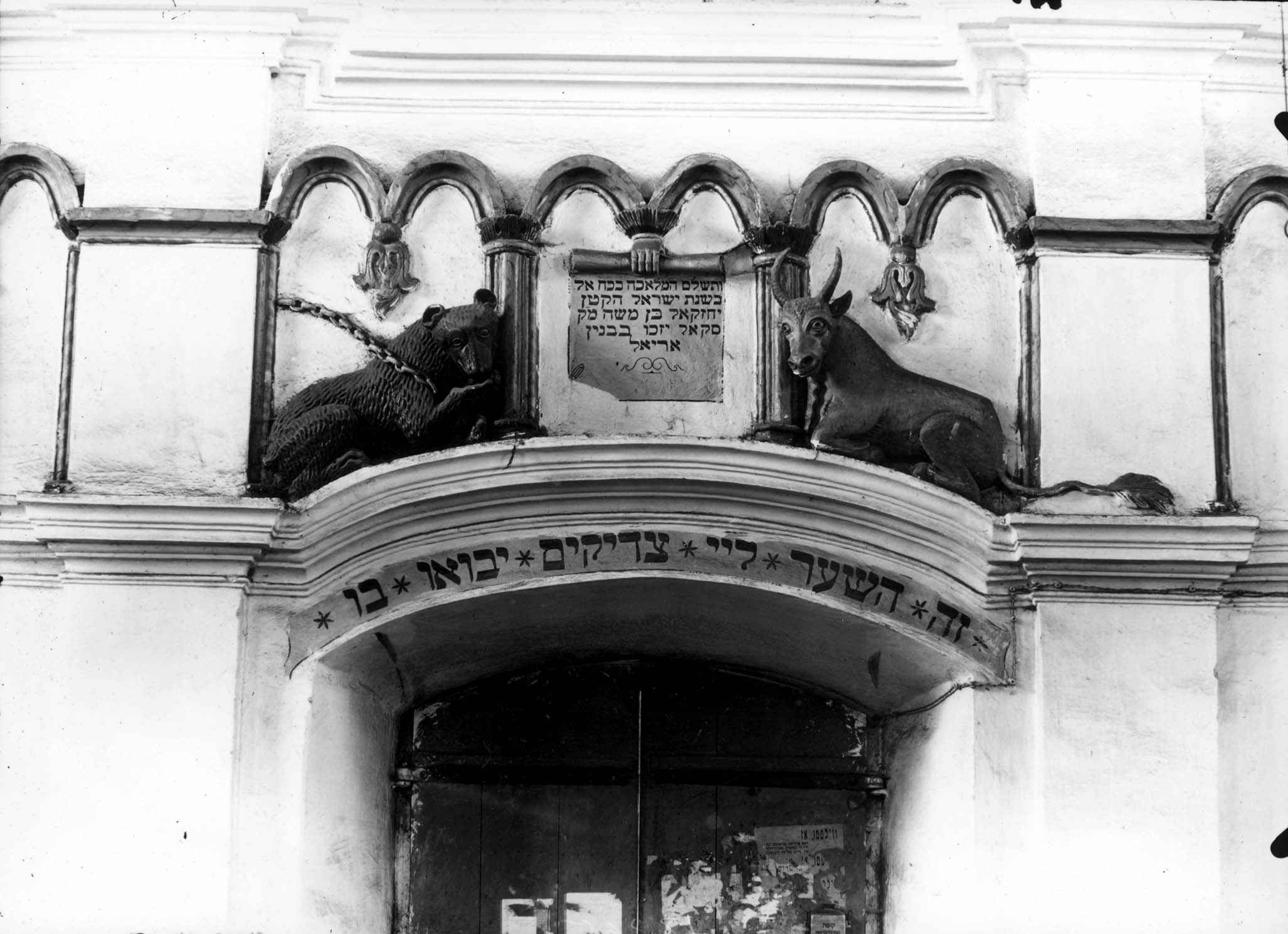 Велика синагога в Мацеїві (тепер Луків Волинської області).